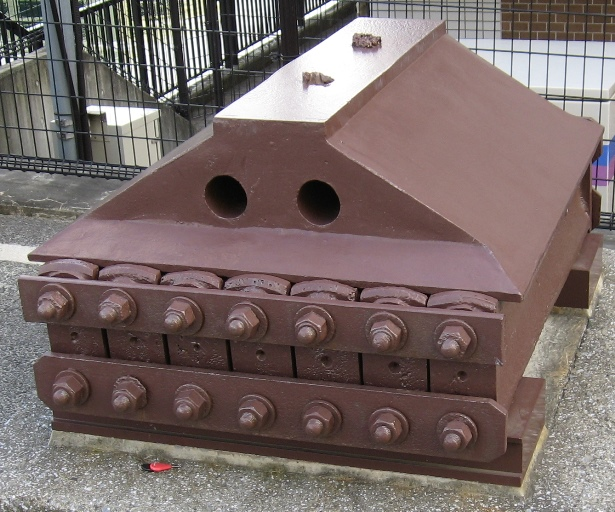 霞橋（横浜市中区） 転用前の江ヶ崎跨線橋時代まで使用されていた沓（支承）